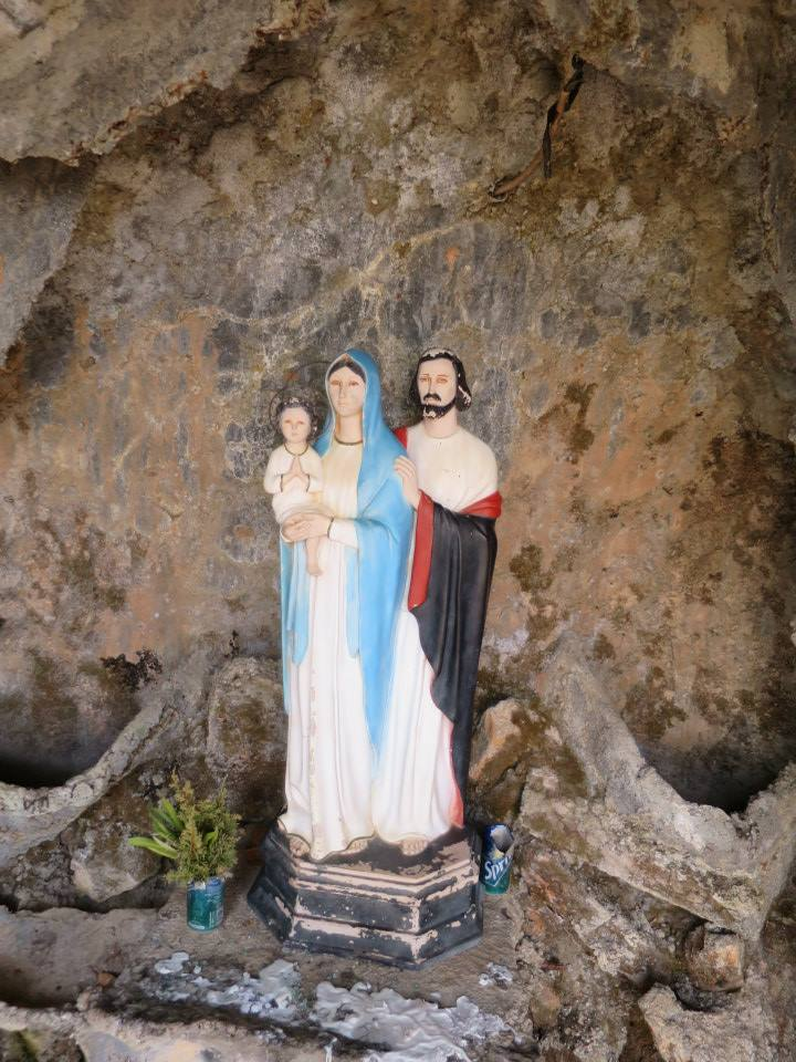 Remexio Vila